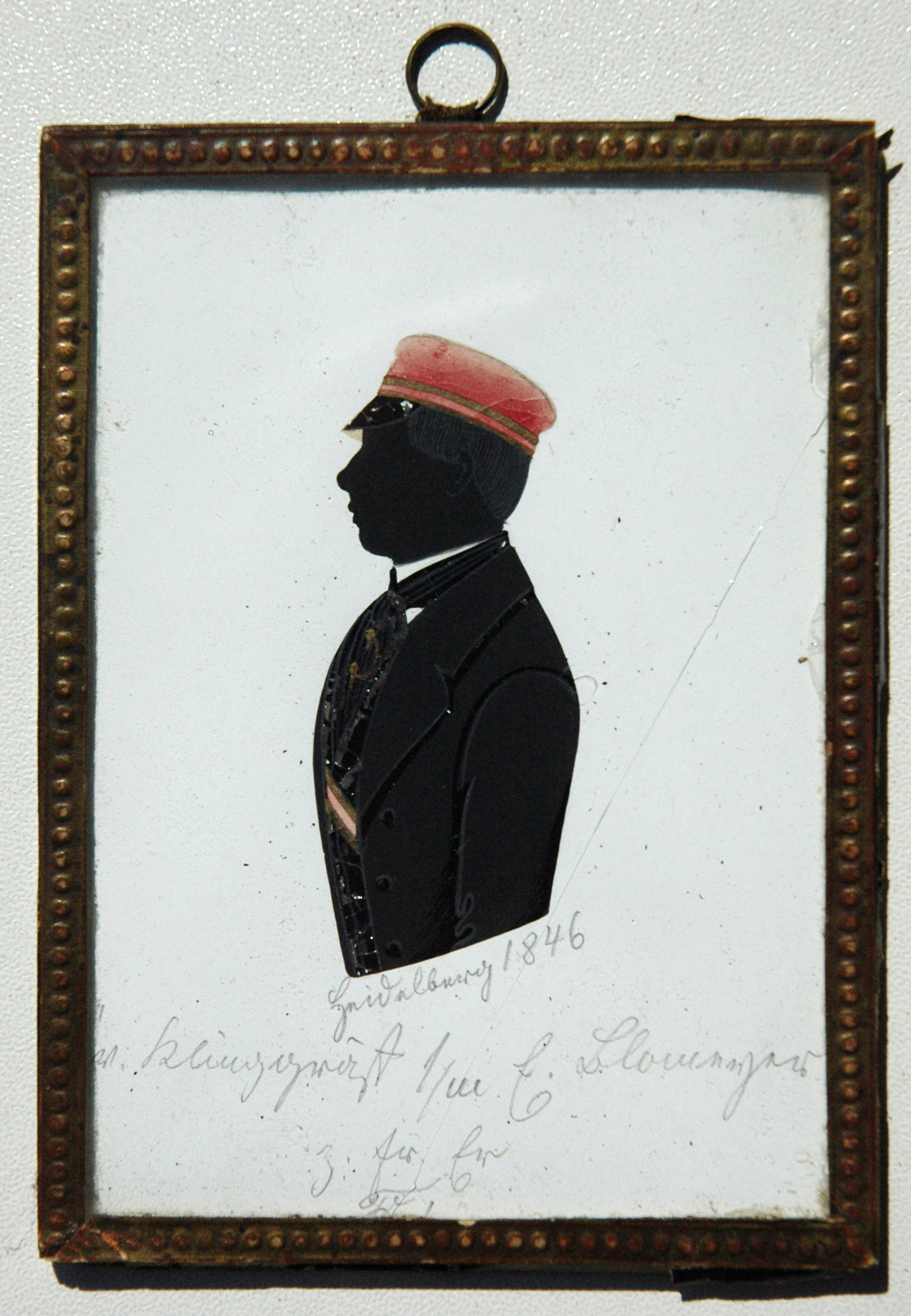 Silhouette of Friedrich von Klinggräff